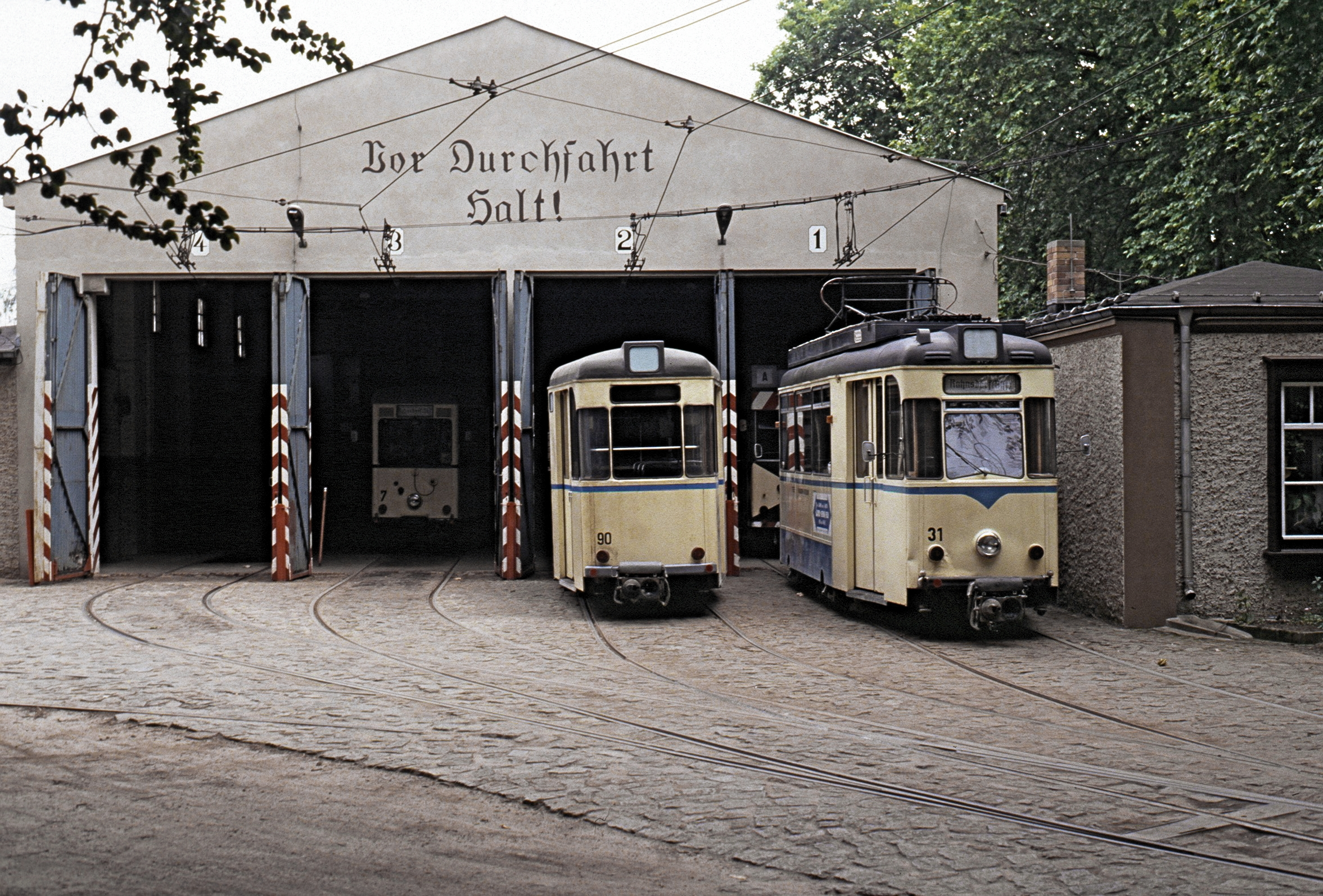 Alte Wagenhalle Woltersdorf: TW 7 (KSW) und 31 (Gotha) und BW 90